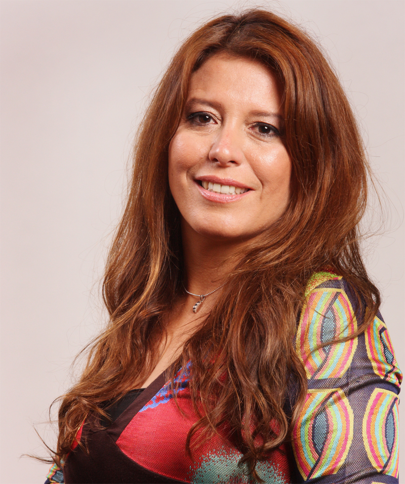 Escritora argentina Viviana Rivero